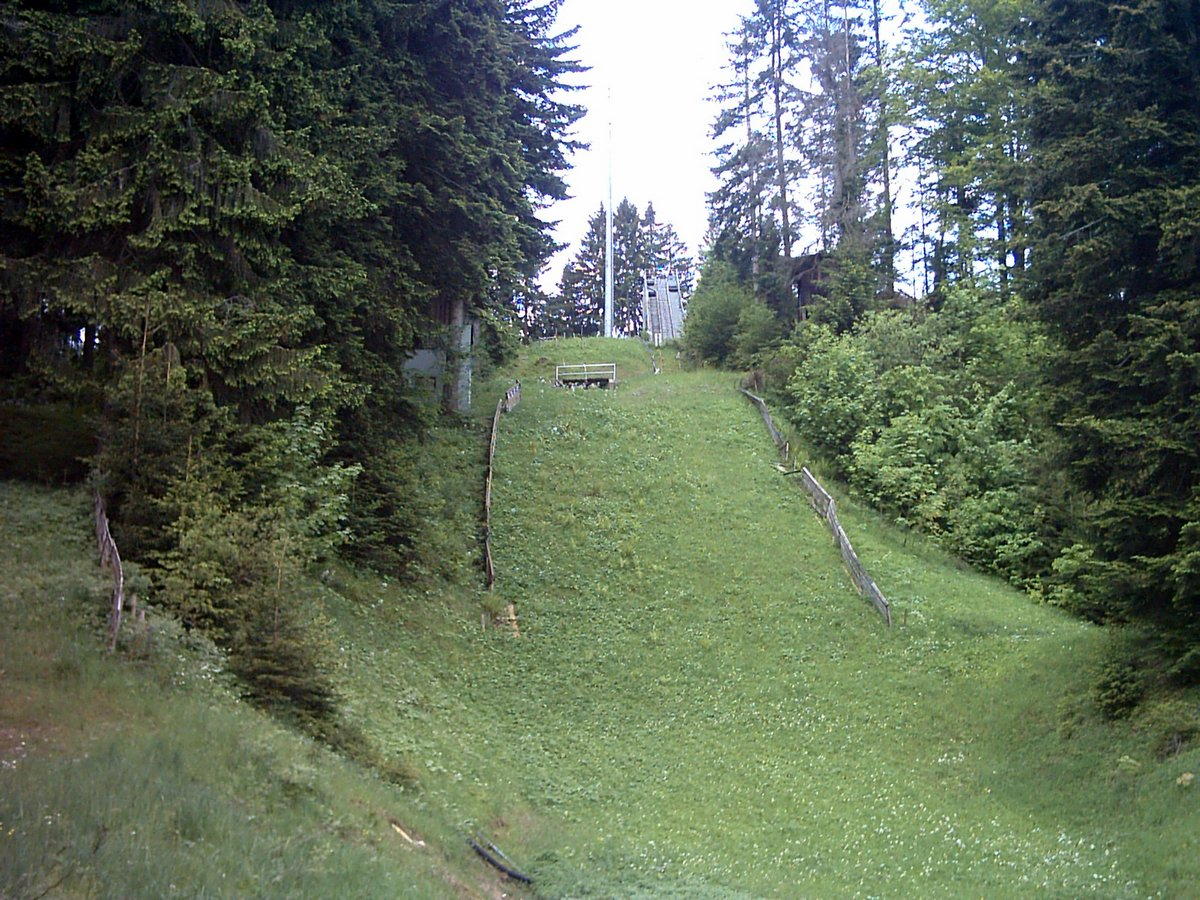 Felsenschanze Ski Jumping Hill in Scheidegg / Allgäu (Germany)